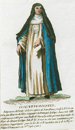 Collection de costumes de tous les ordres monastiques, supprimés à differentes époques, dans la ci-devant Belgique, Bruxelles, Philippe Joseph Maillart et sœur, 1811